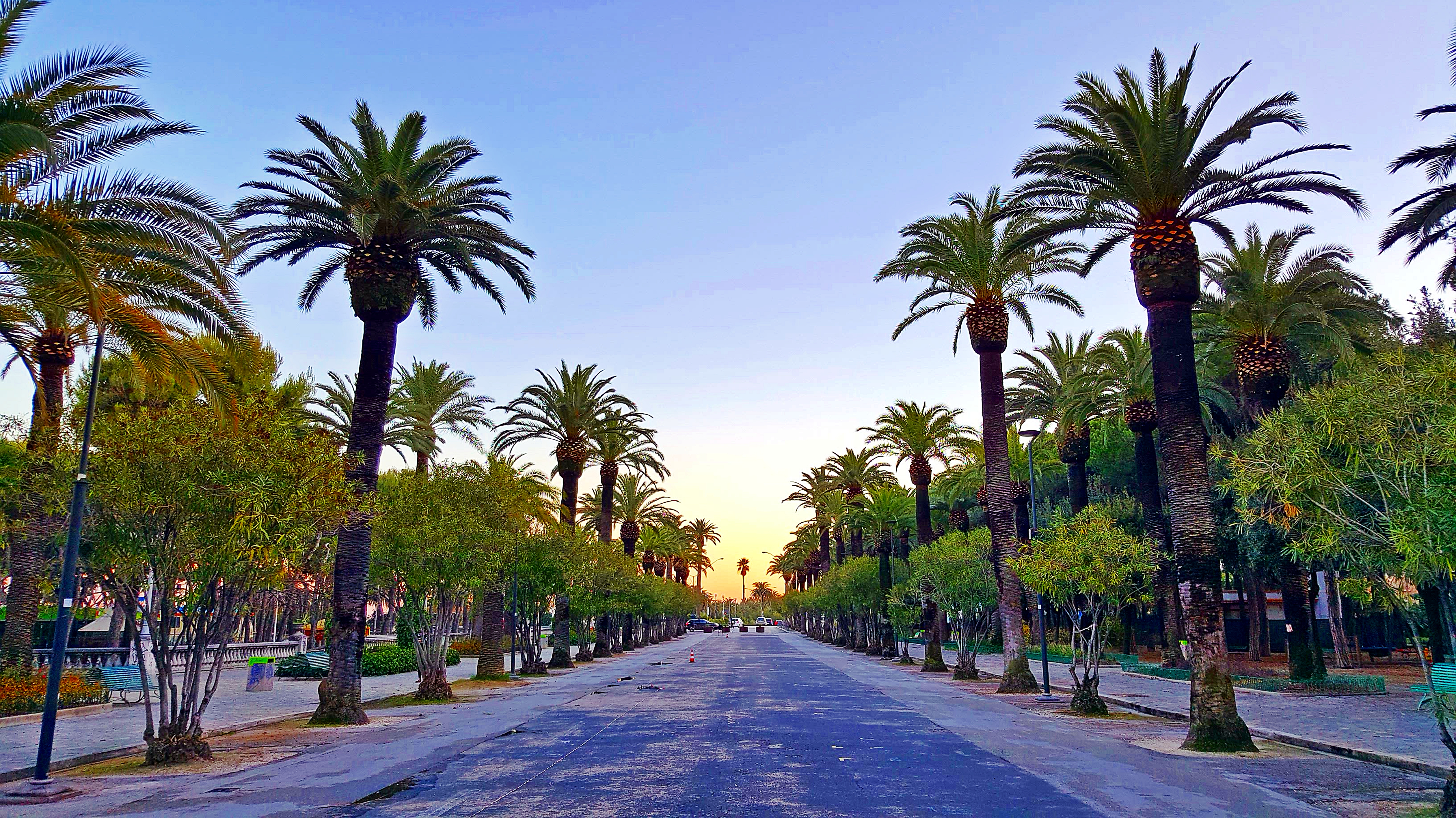 Viale Bruno Buozzi porta d'ingresso sul Lungomare di San Benedetto del Tronto.